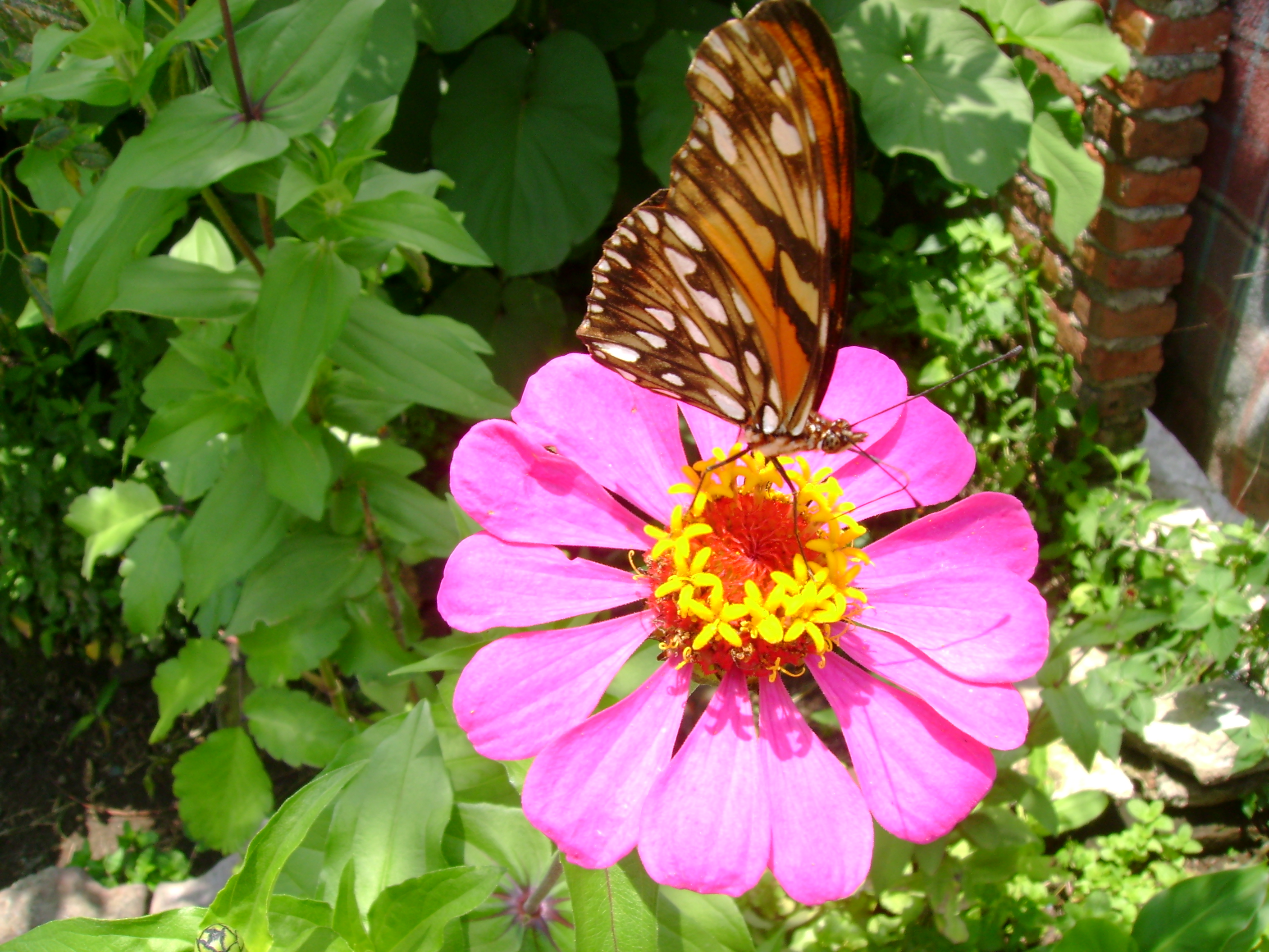 Una mariposa posa sobre una flor en el municipio de Tonila, Jalisco, México.